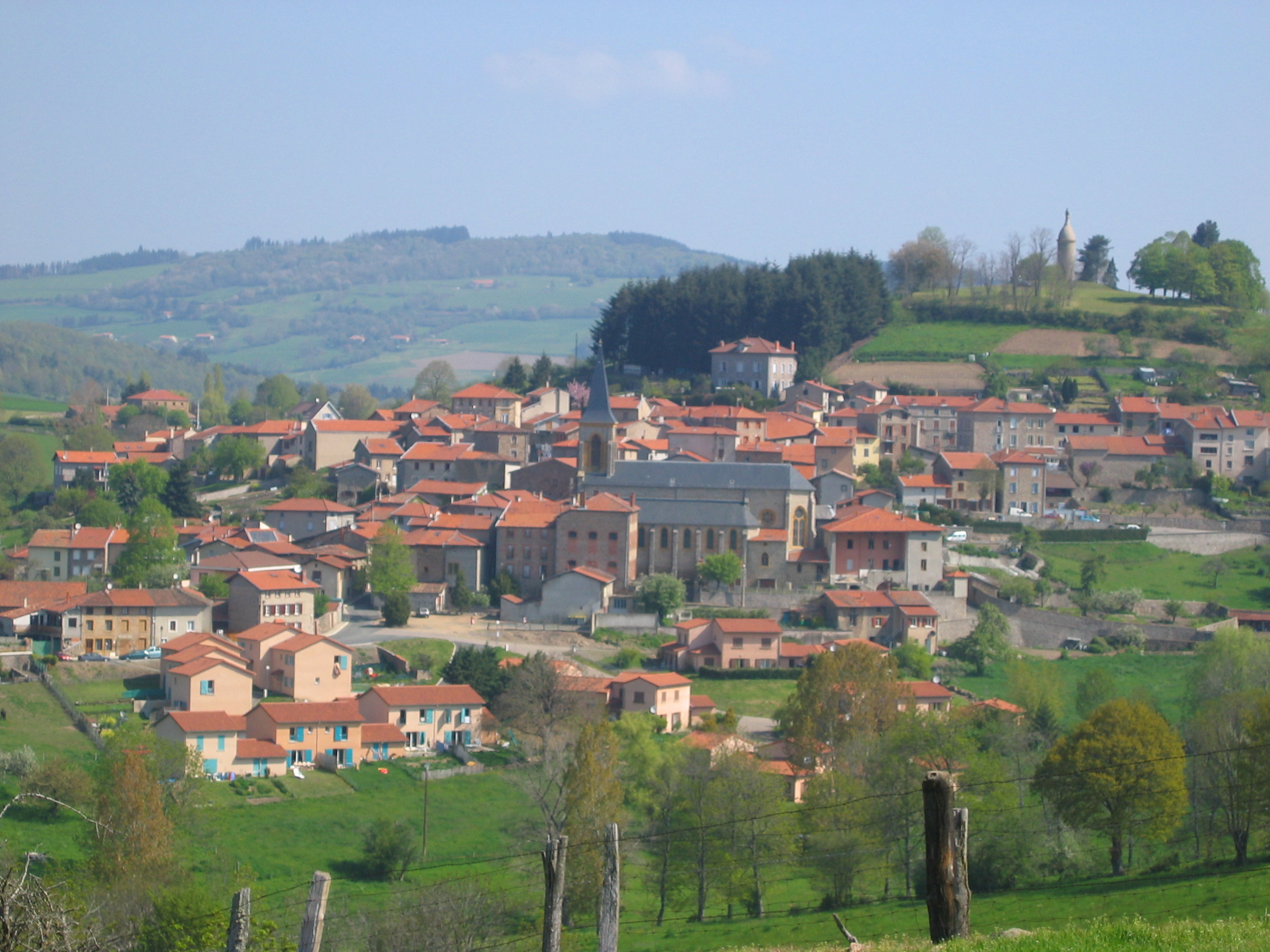 Le village de Villechenève